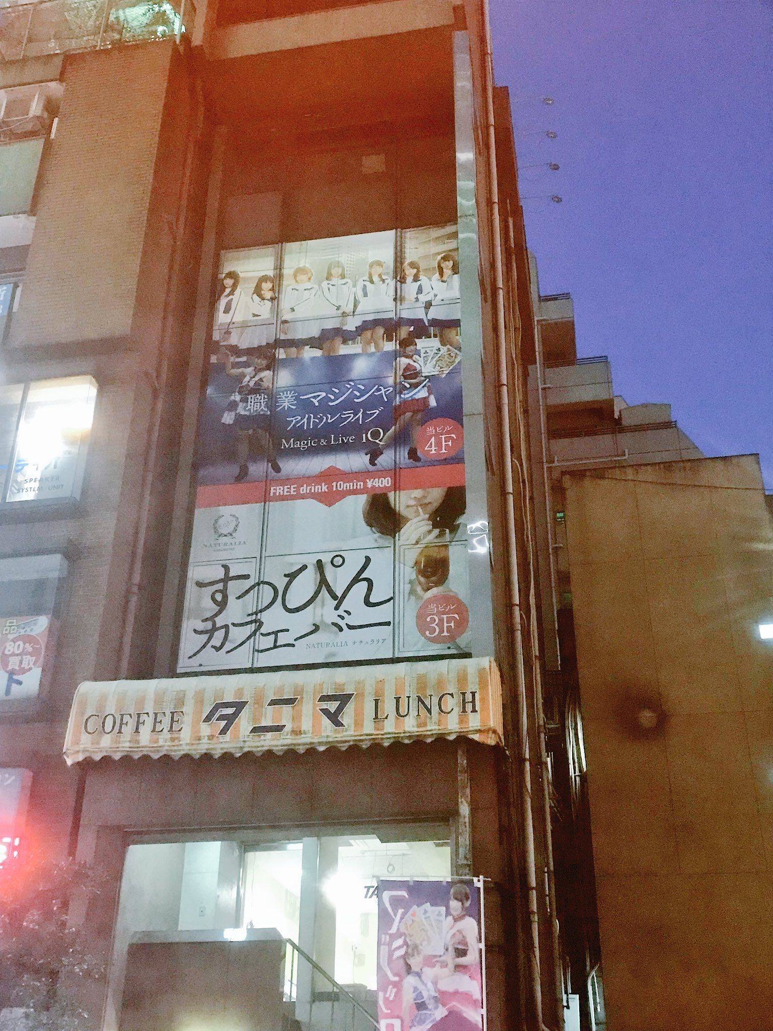 11月25日ビル前にてルルネージュを撮影